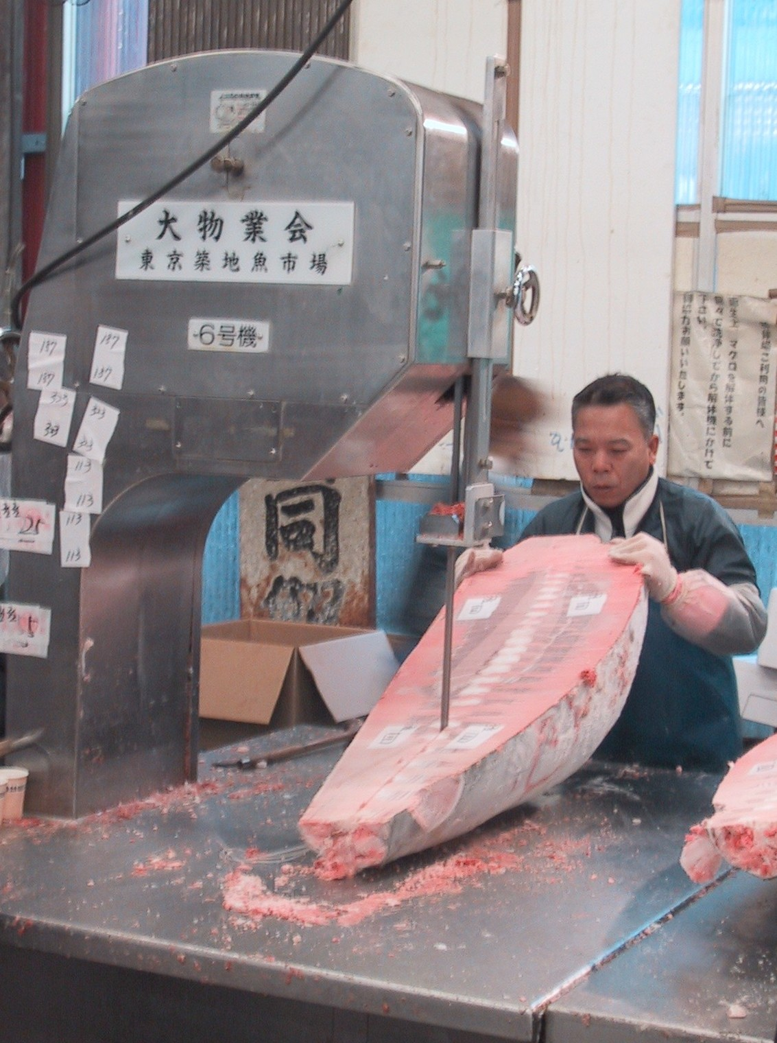 Zuschnitt gefrorenen Thunfischs auf einer Bandsäge auf dem Tsukiji-Fischmarkt in Tokyo